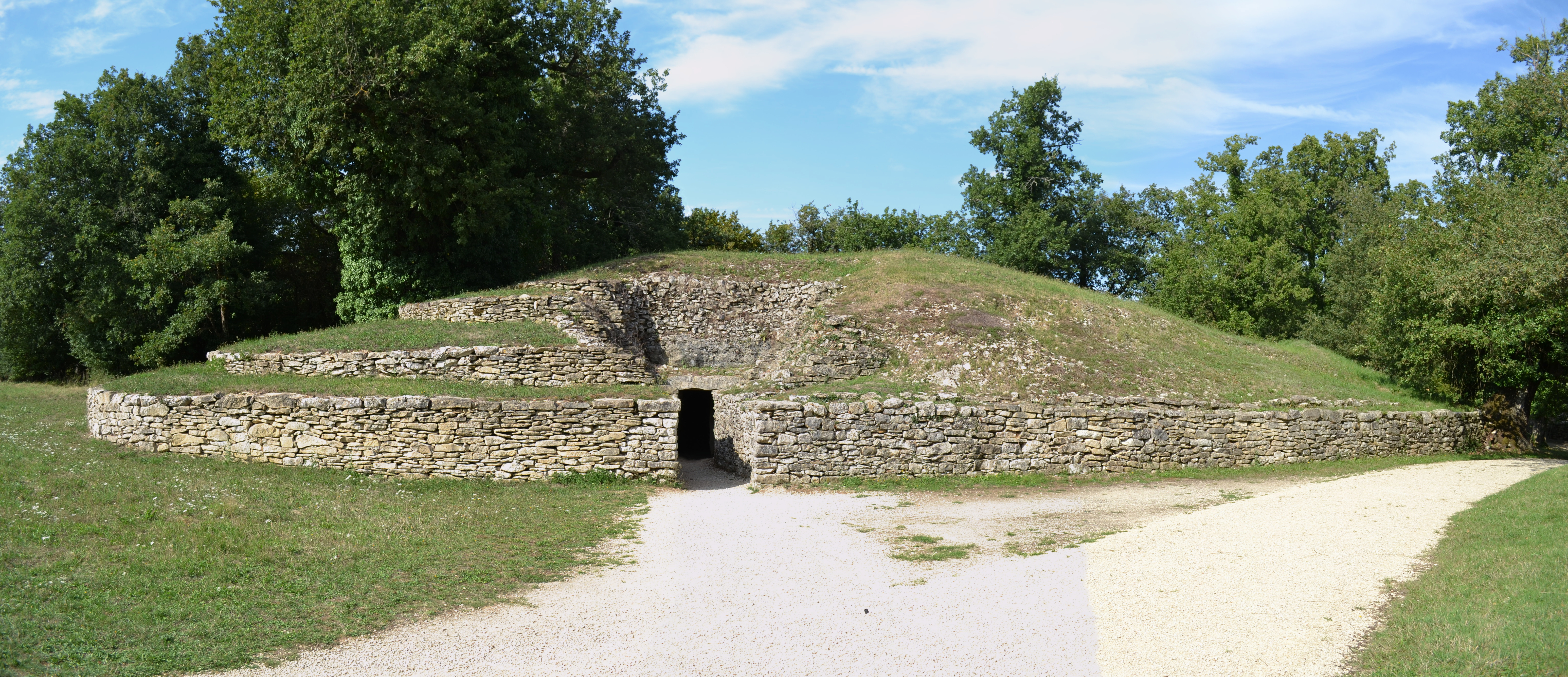 Tumulus A, nécropole de Bougon, Deux-Sèvres, France